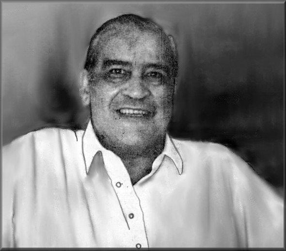 Angel Cappelletti